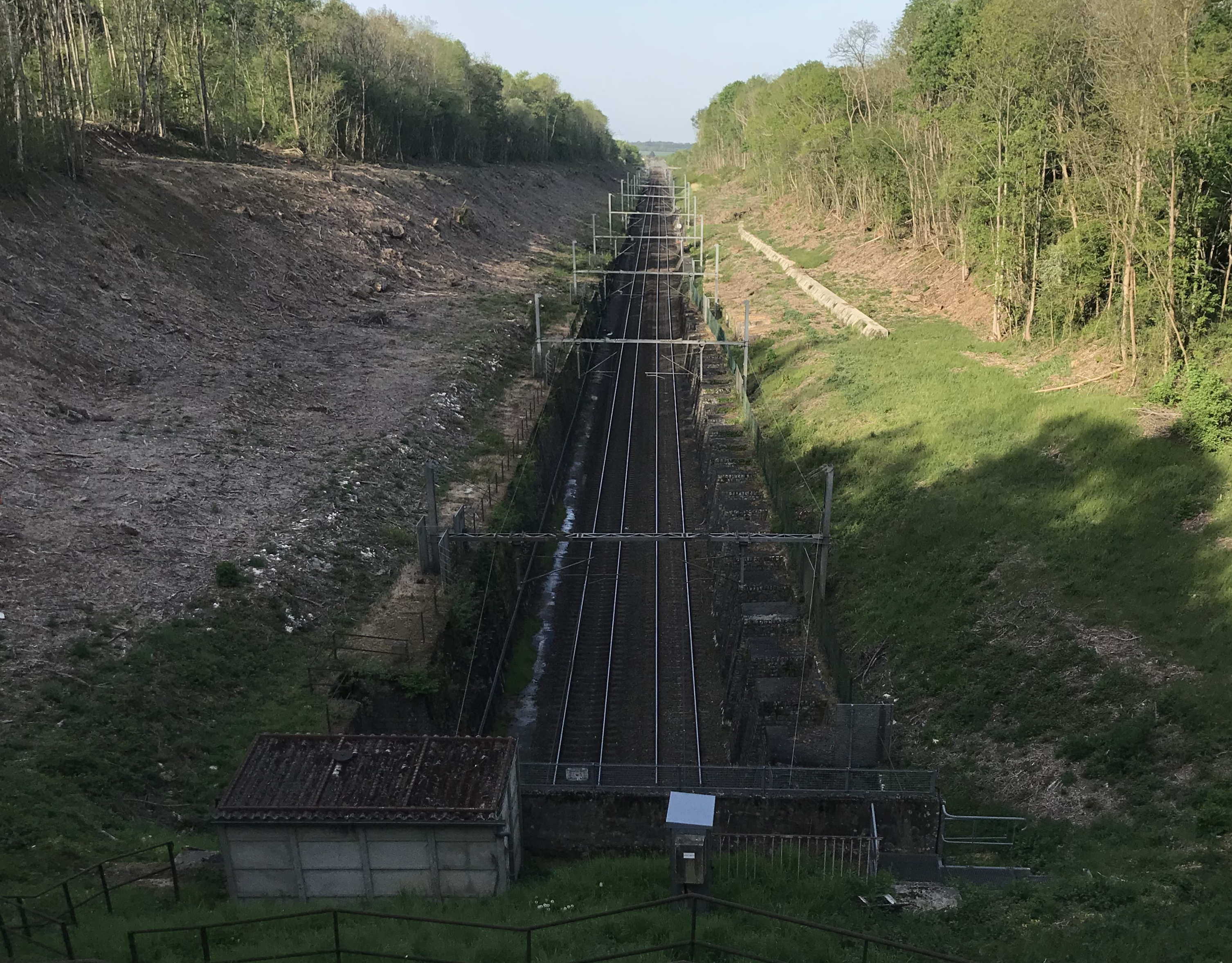 Tranchée ouest du tunnel de Bréval.